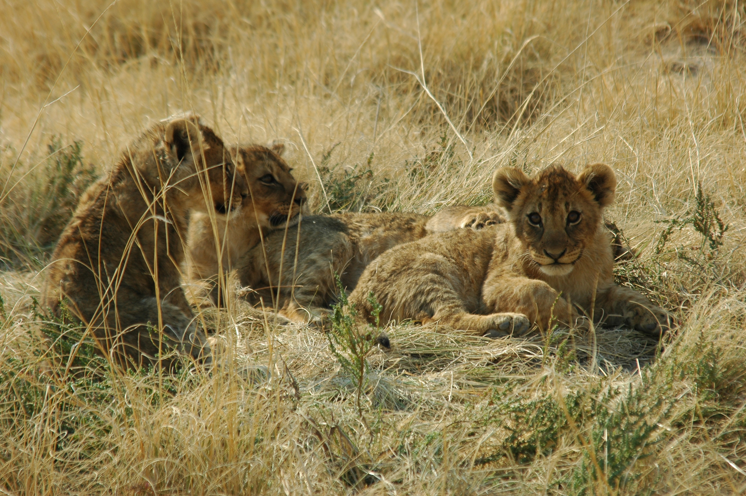 Namibie Etosha National Park Lionceaux Photographie prise par GIRAUD Patrick